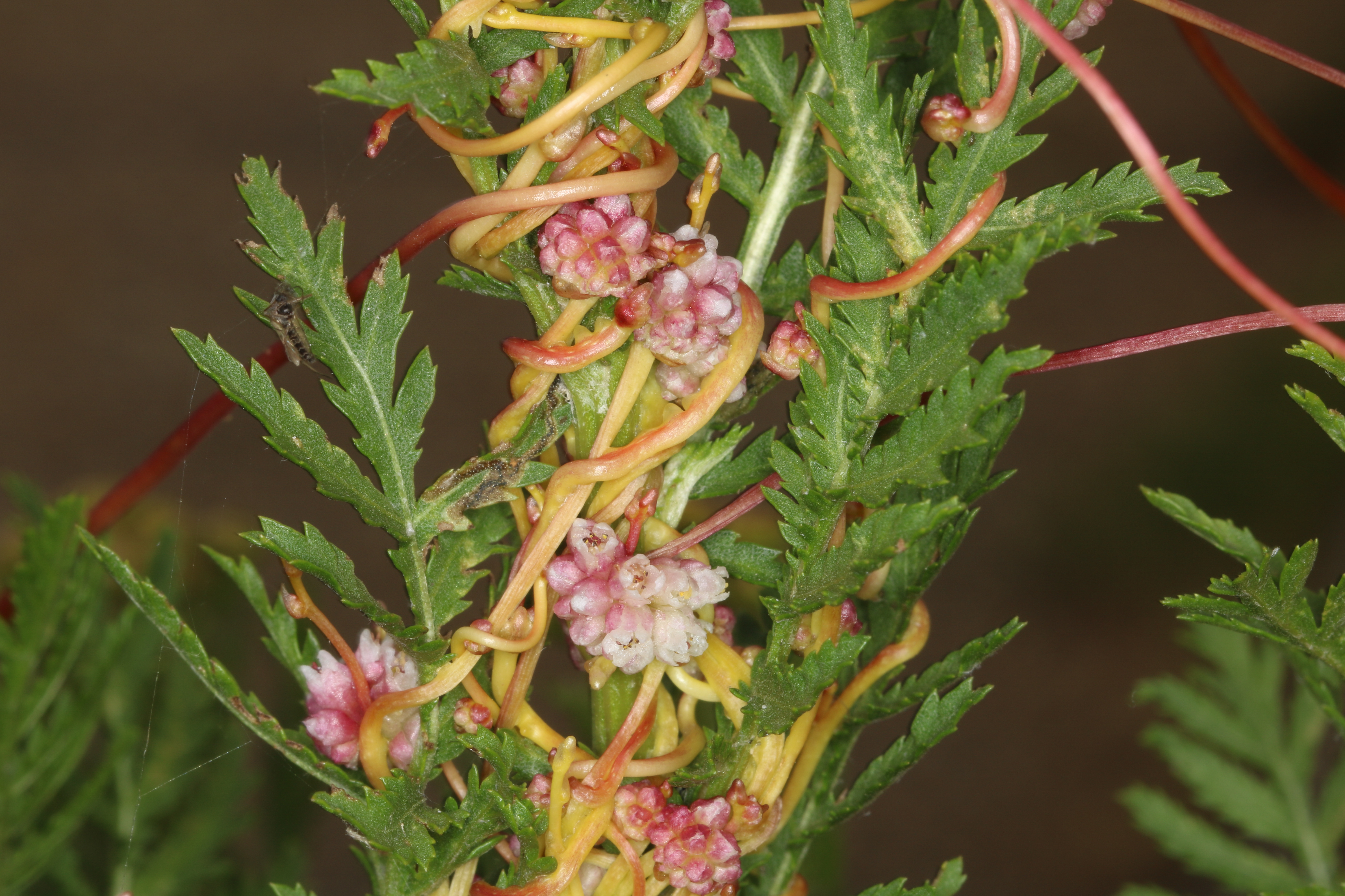 Cuscuta europaea L. on Tanacetum vulgare L., Utterslev Mose, Søborg, Denmark, 11 July 2015